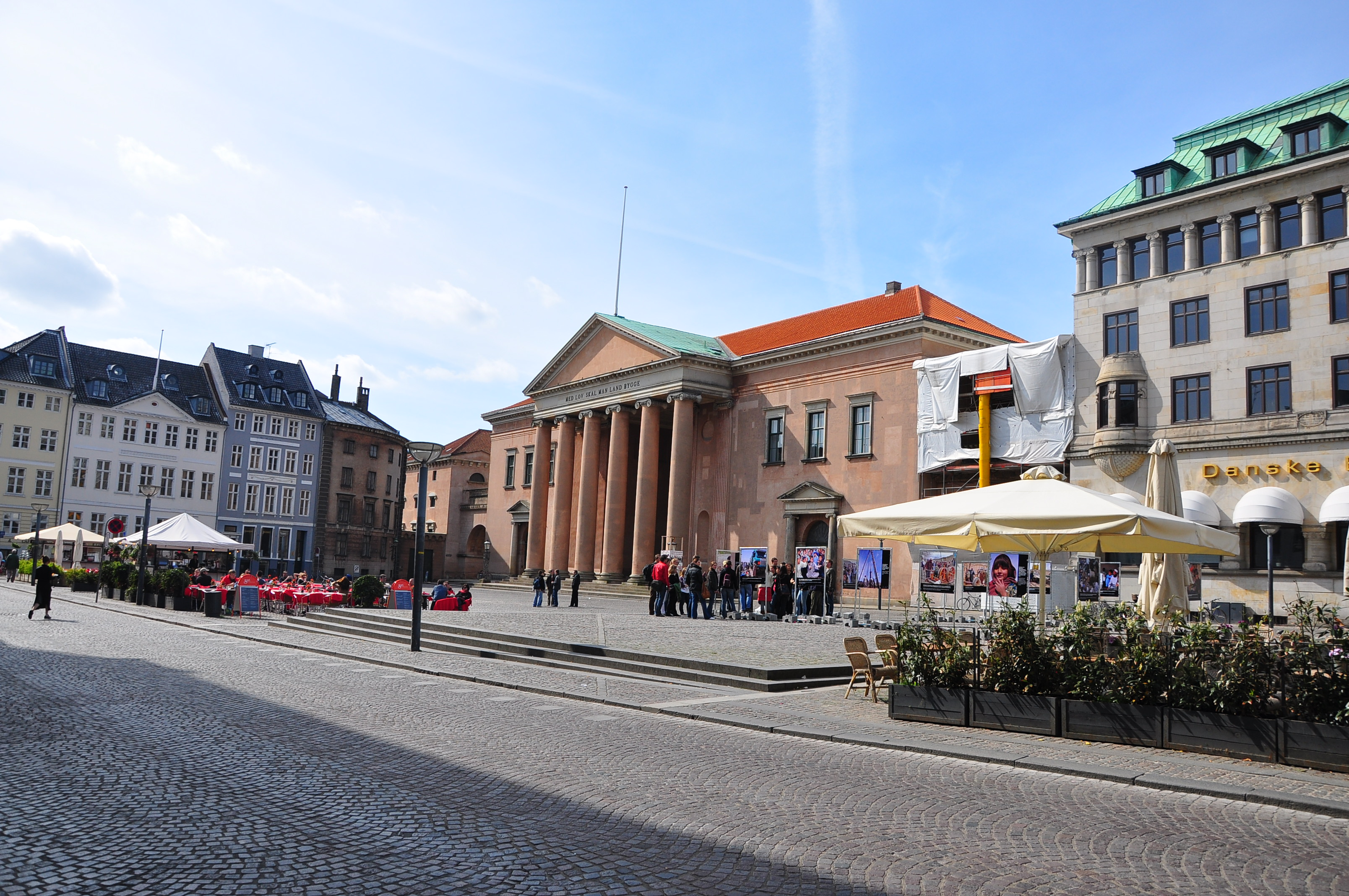 Nytorv in Copenhagen, Denmark